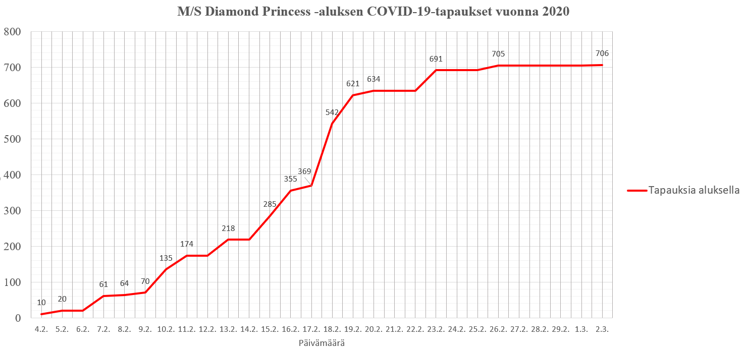 Taulukko vuoden 2020 koronavirustapausten määrästä M/S Diamond Princess -loistoristeilijällä.